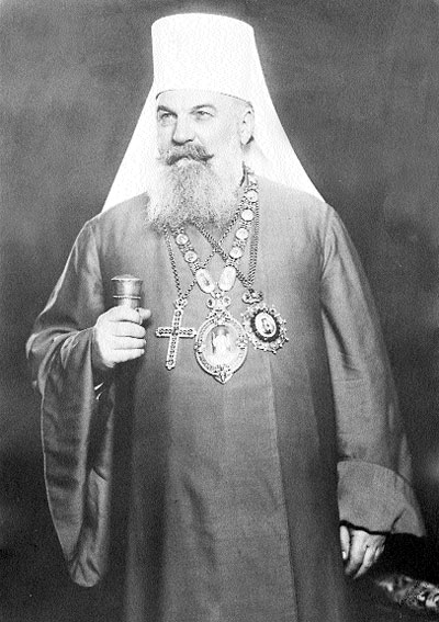 Патриарх Сербский Гавриил V